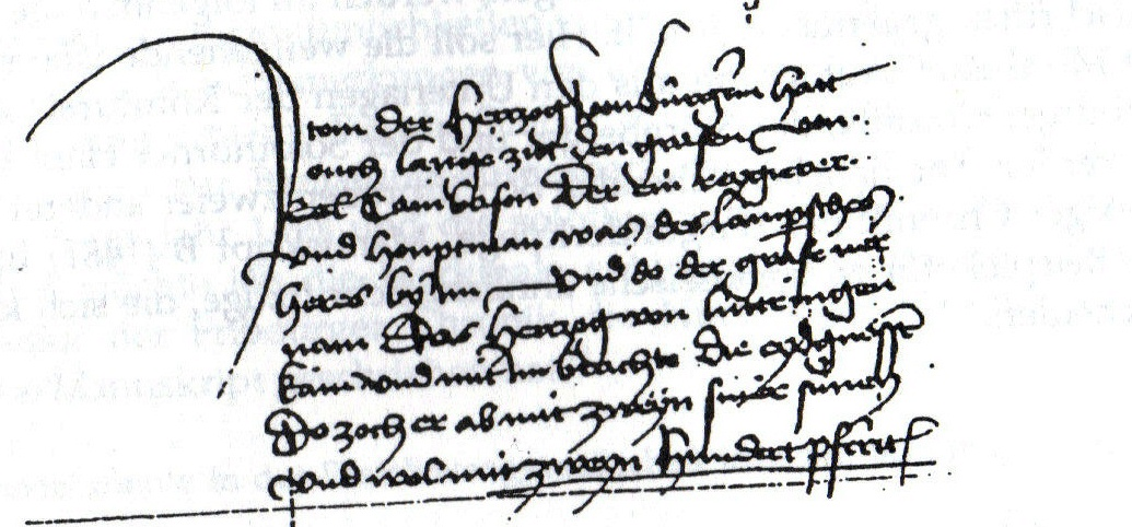 Autograph der Freiburger Burgunderkrieg-Chronik des Peter von Molsheim, UB Fribourg, Soc. ec. D 410, Bl. 212v